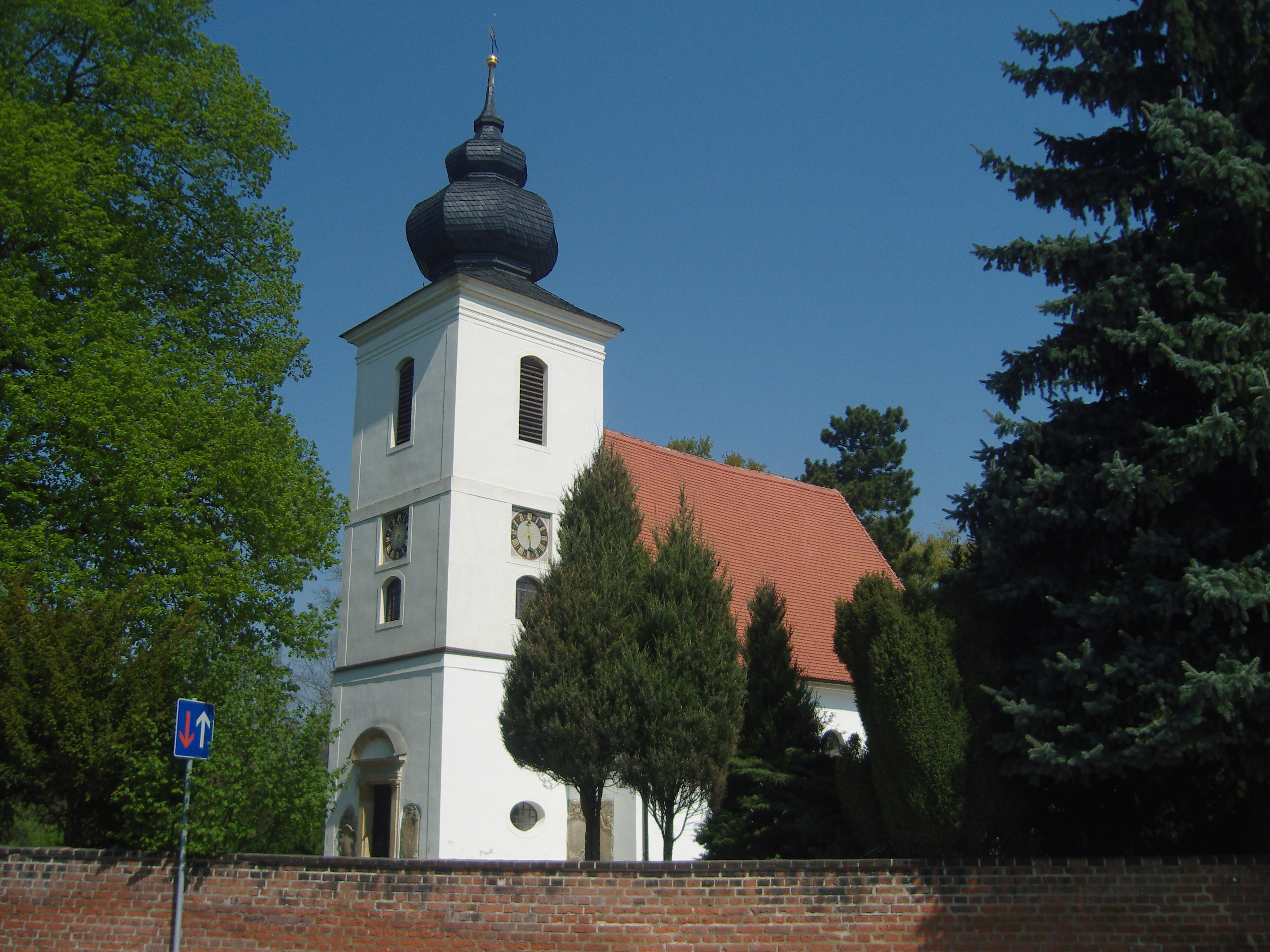 Kirche in Burgkemnitz